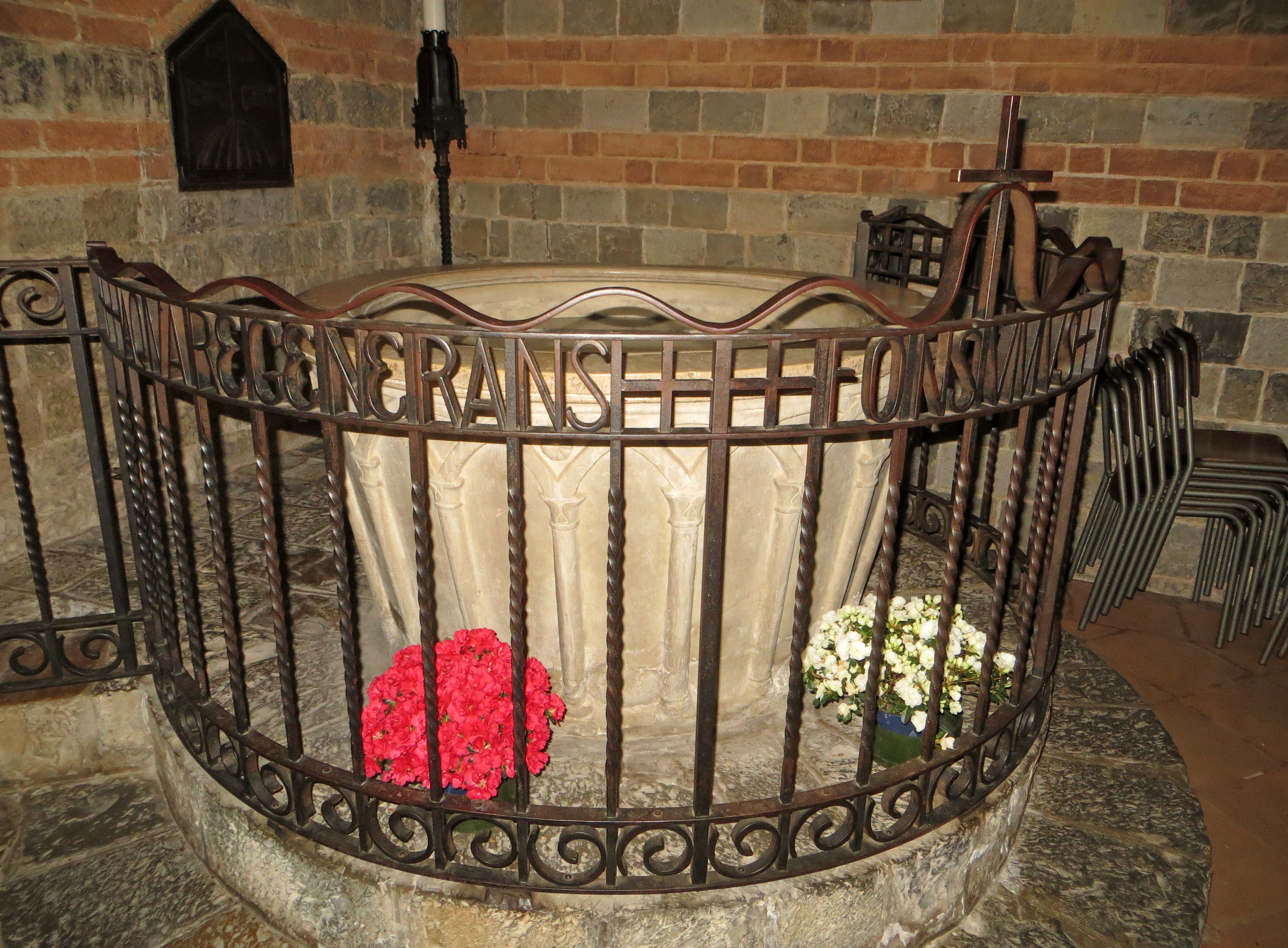 Pieve di San Prospero (Collecchio) - fonte battesimale